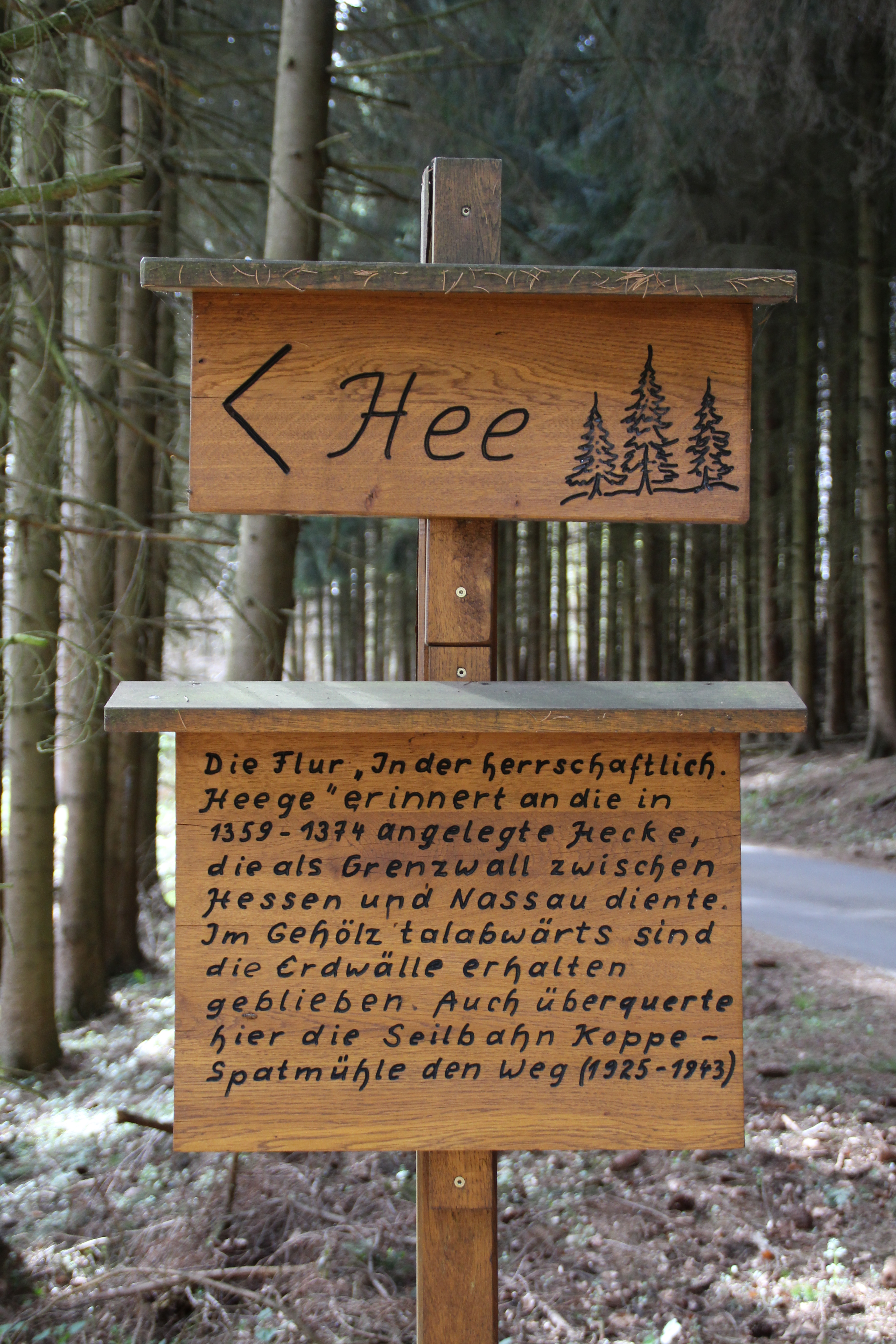 Hinweisschild auf Landheege